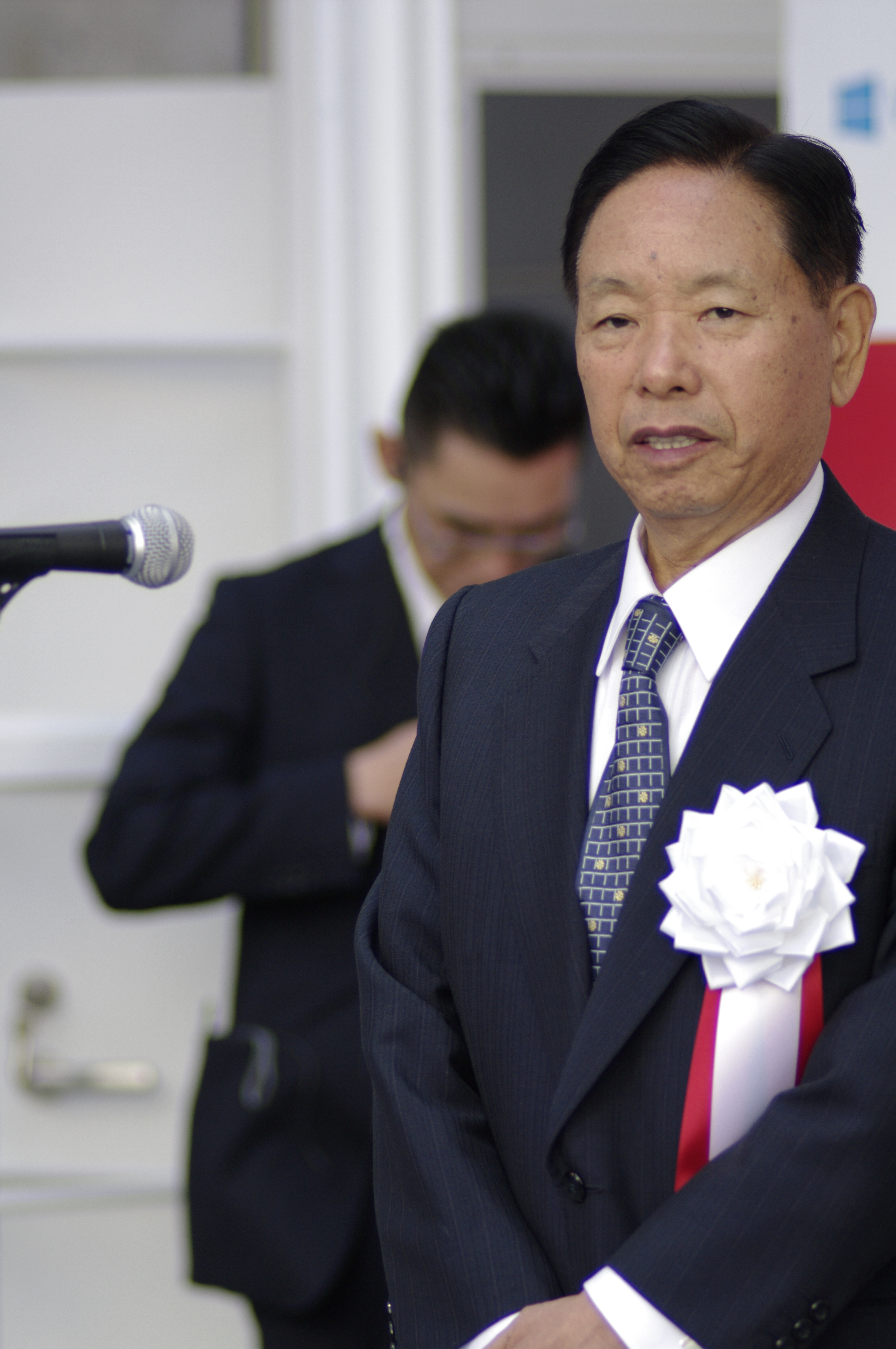 Windows 8を「一生懸命使っていただいて」ってのが何か記憶に残ってる